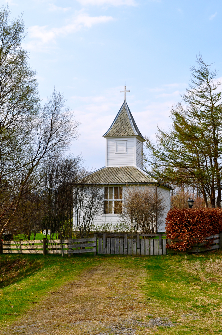 Klokke-støpel på Berle gravplass, etter kyrkja vart bygt er det nytta som reiskapskur.